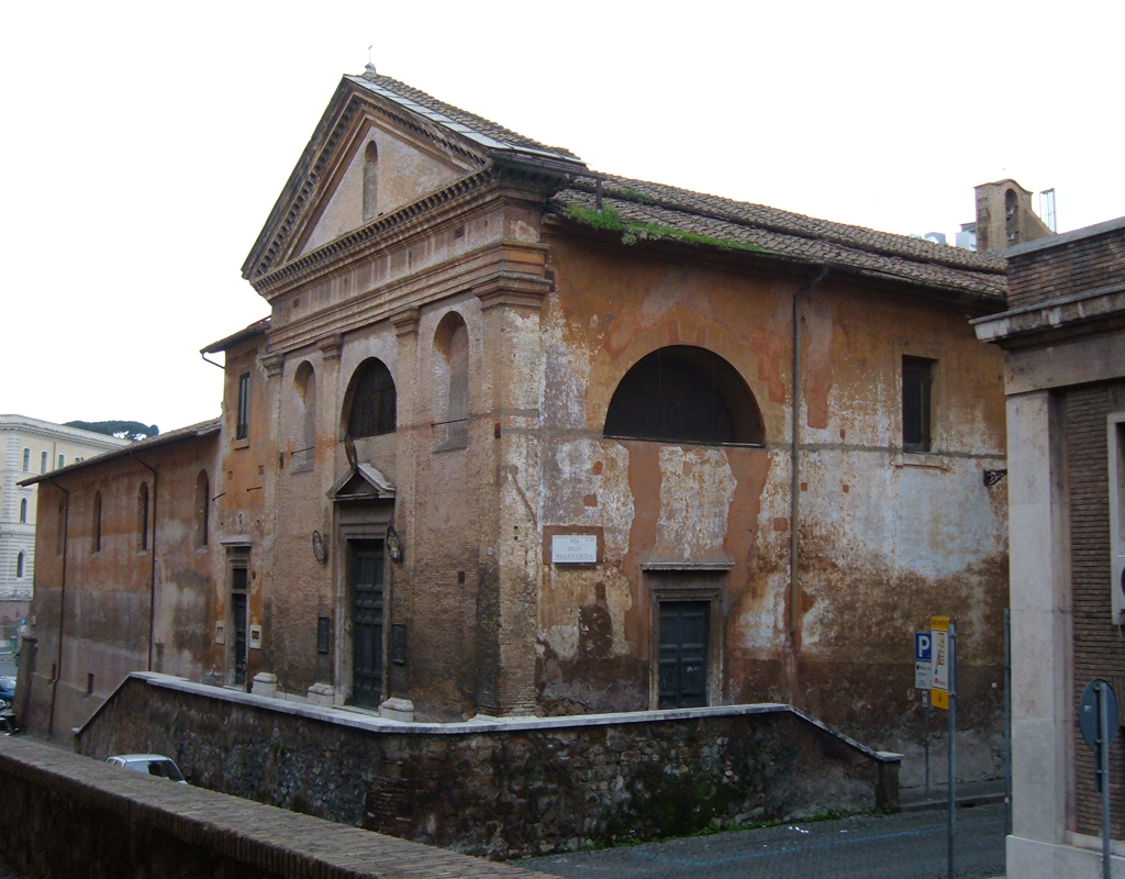 Chiesa di San Giovanni Decollato, a Roma, nel rione Ripa. Foto personale.